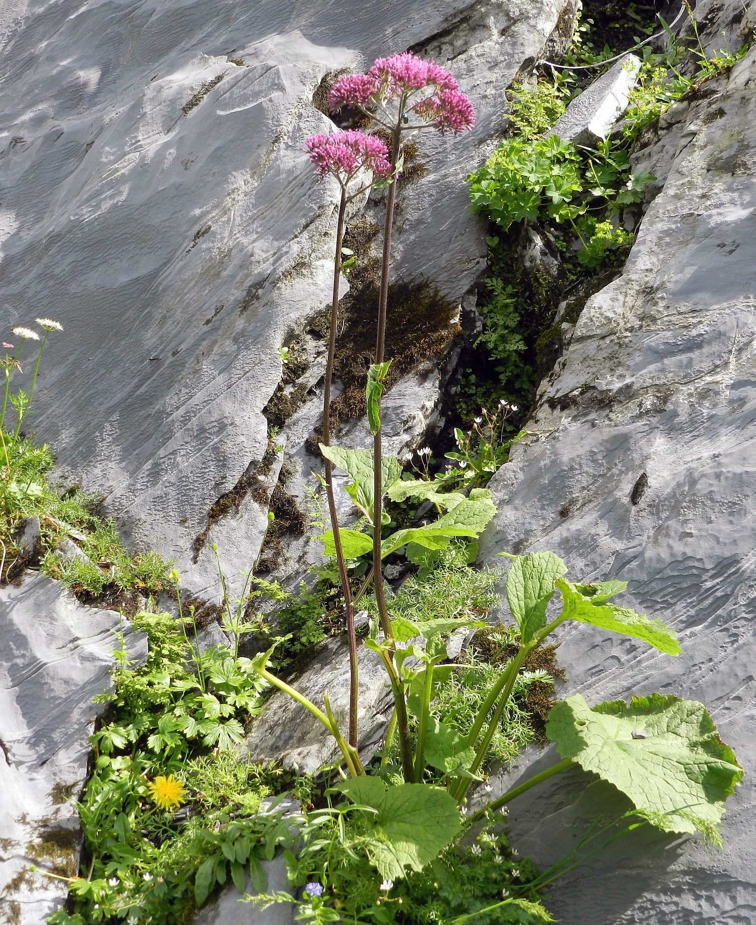 Grauer Alpendost in den Zilertaler Alpen (Tirol, Österreich). Standort auf etwa 2000 m Höhe am Brandberger Kolm.